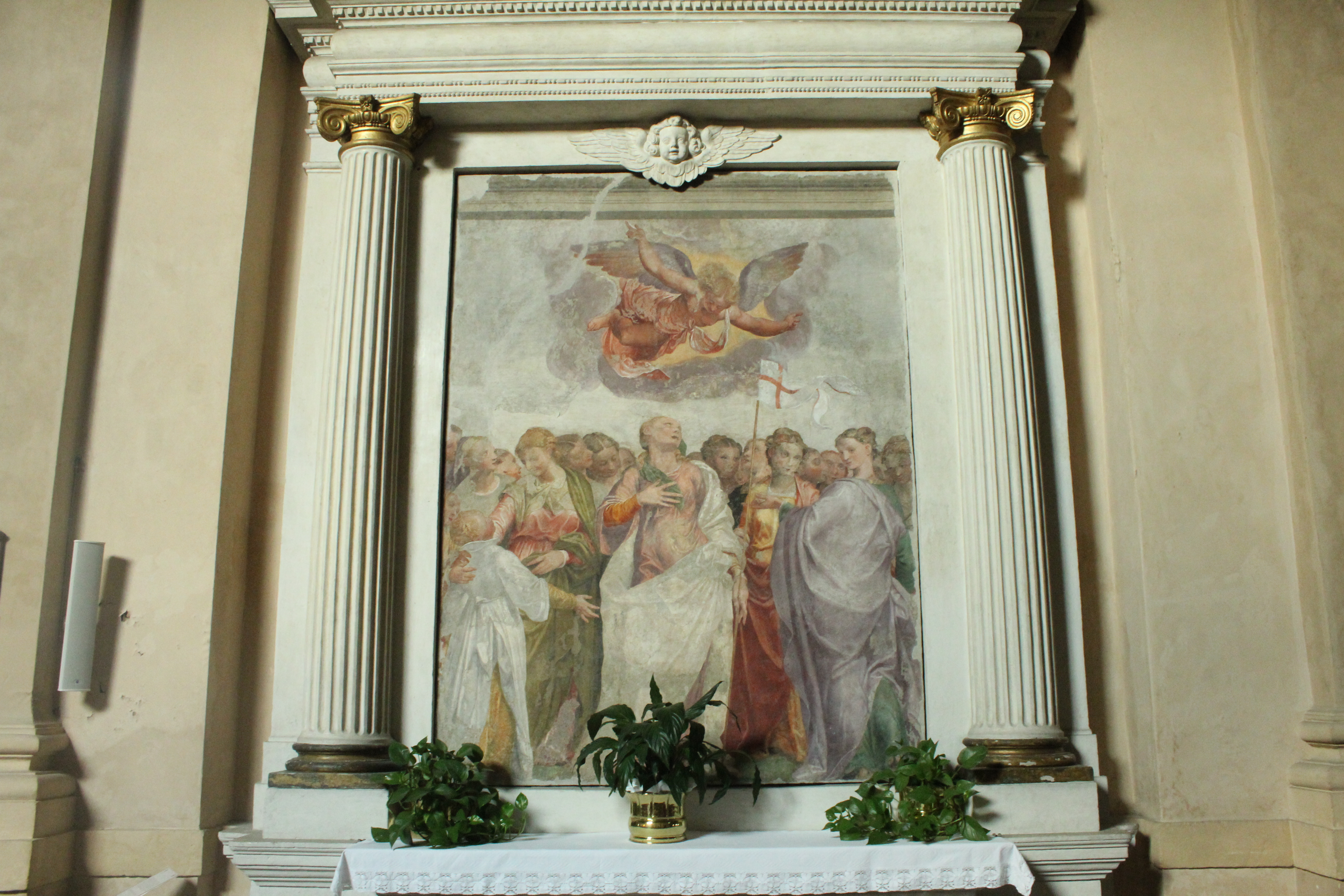 Chiesa della Santissima Trinità in Monte Oliveto a Verona. Tela "Santa Orsola e Compagne" opera del pittore Domenico Brusasorzi